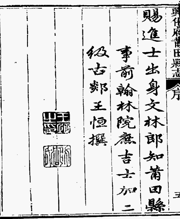 郯城縣志卷首序文